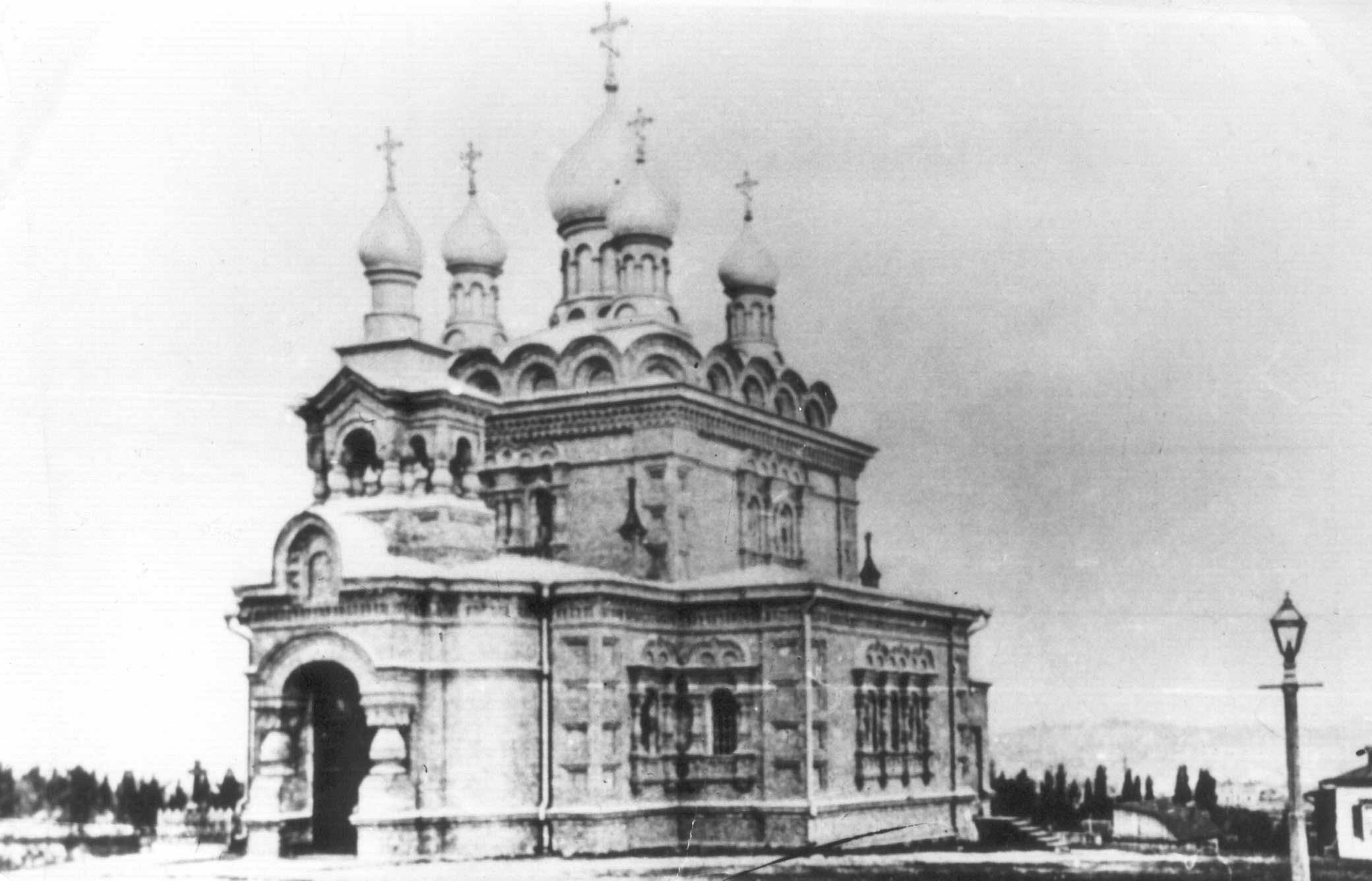 Покровская церковь на Соломенке. Фото конца 1890-х гг.